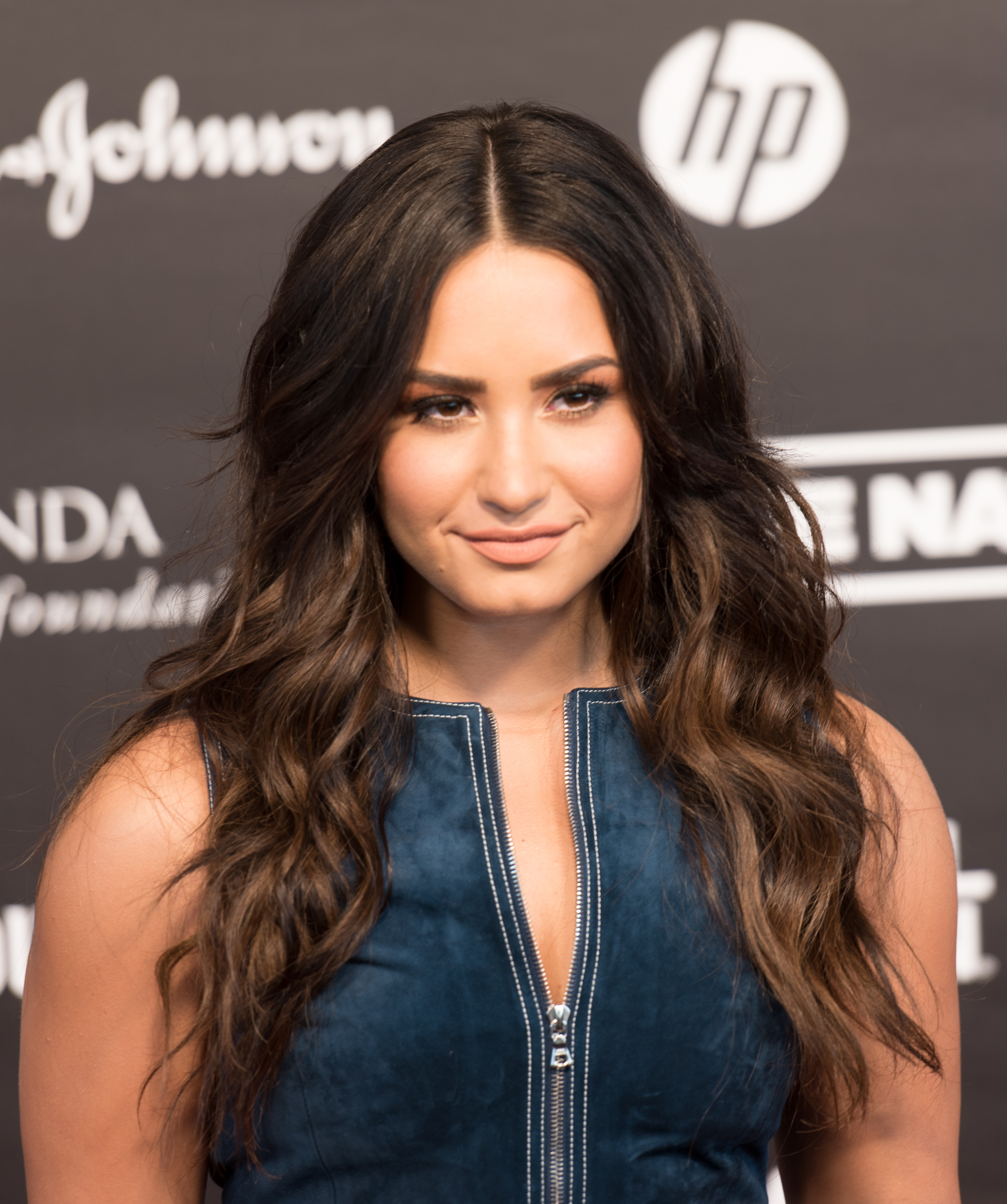 Demi Lovato beim Global Citizen Festival in Hamburg